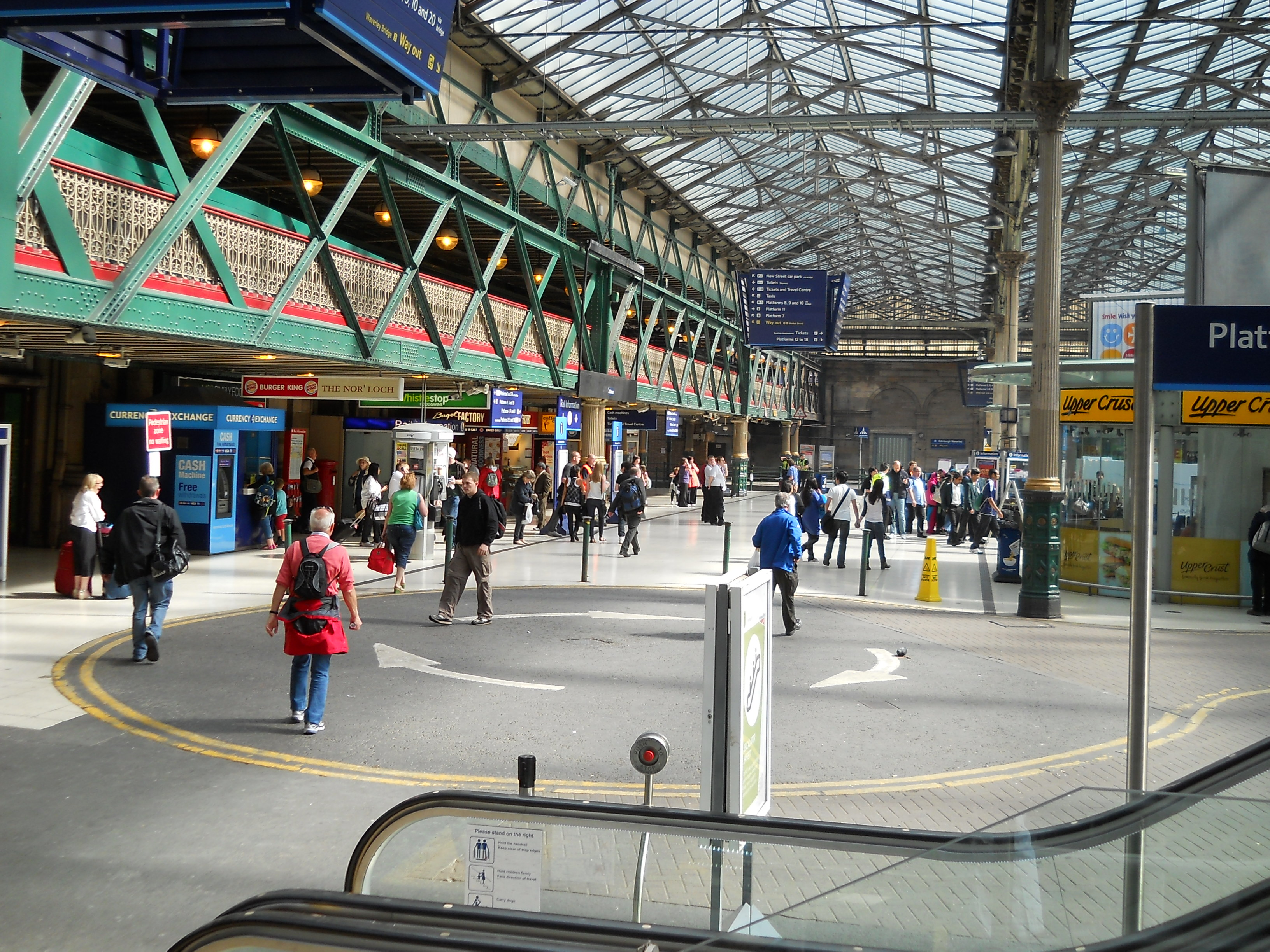 Stazione di Edinburgo Waverley